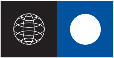 Bandera de la Universidad Central de Chile